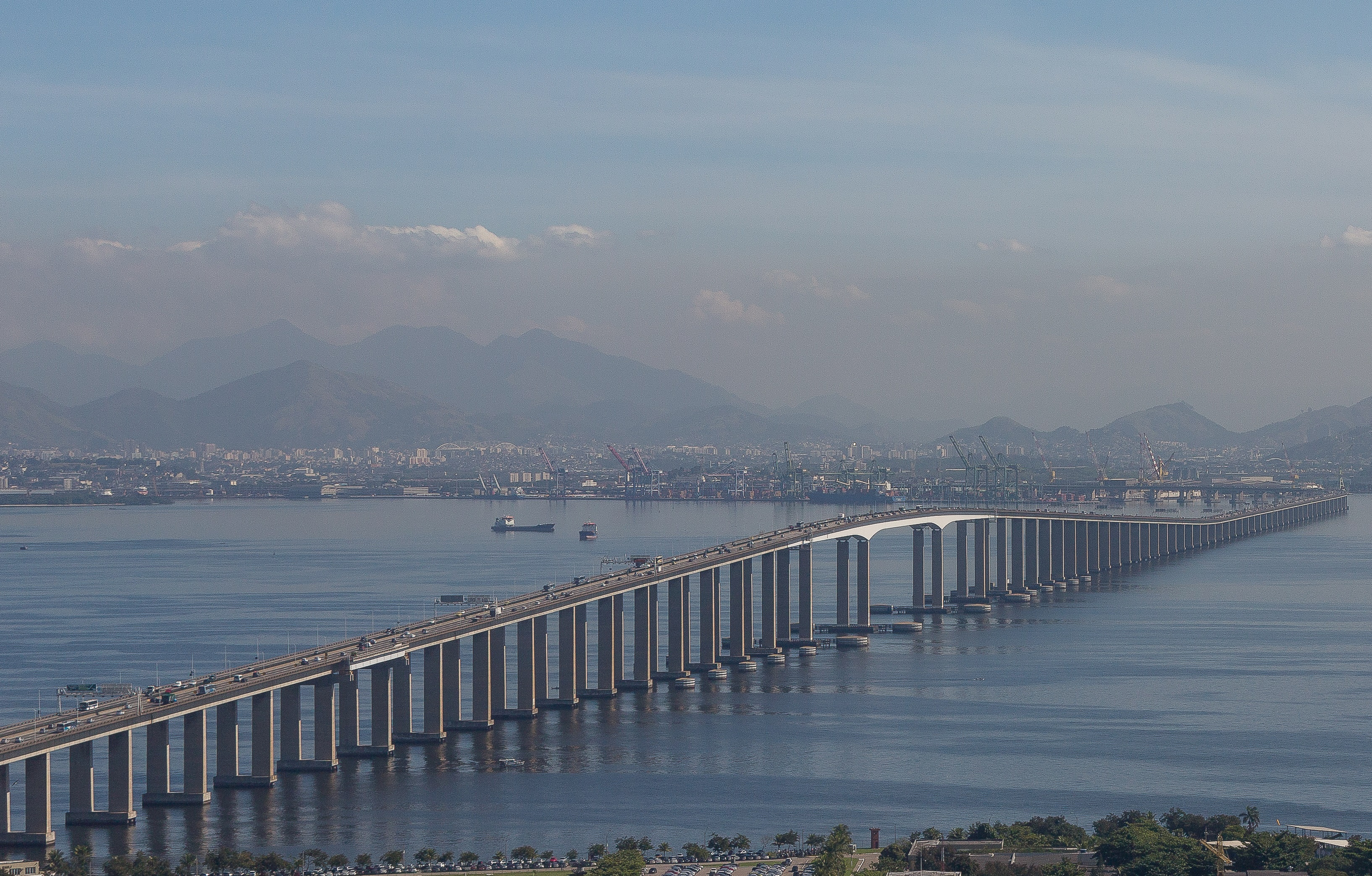 Vista aérea da Base Naval do Rio de Janeiro, localizada na Ilha de Mocanguê e Ilha de Mocanguê Grande, Niterói - RJ - Brasil.